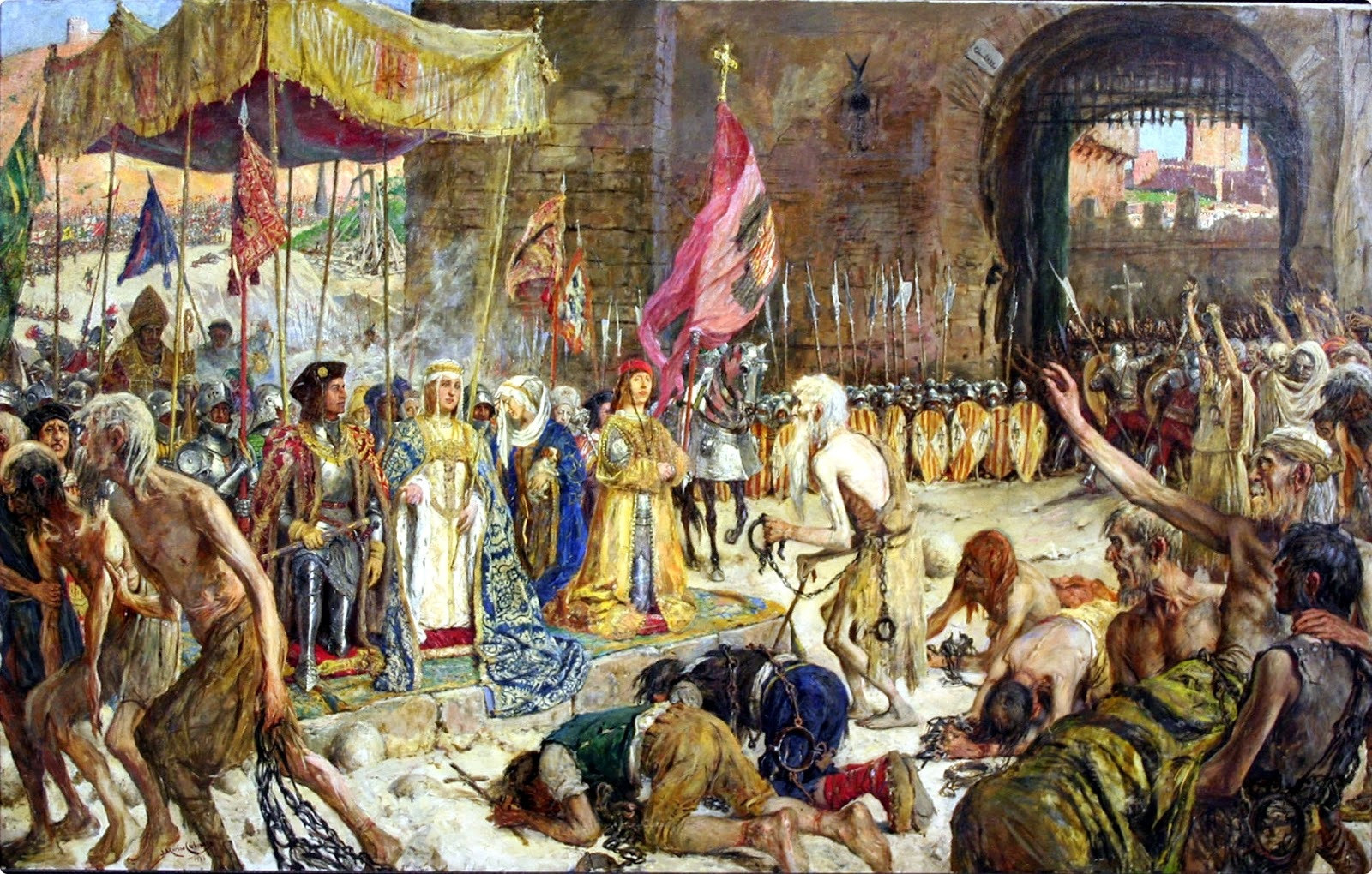 La obra representa a los Reyes Católicos liberando a los cautivos cristianos que se hallaban en poder de los musulmanes tras haber conquistado en 1487 la ciudad de Málaga.